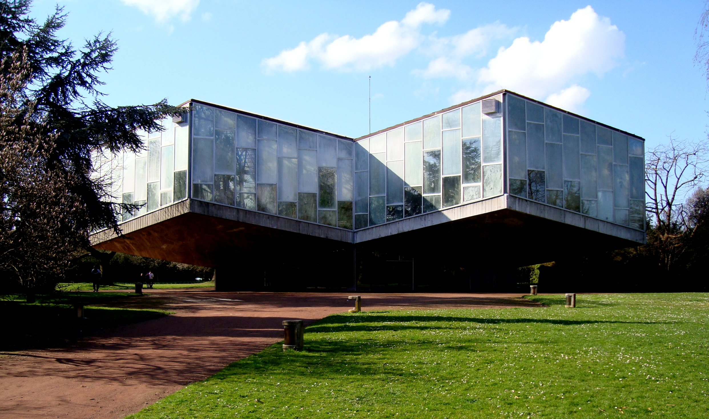 La serre équatoriale du jardin des plantes de Lille (Nord) construite en 1970 par l’architecte Secq. C'est une plate forme de 1 200 m² à huit mètres au-dessus du sol qui a nécessité 1 400 tonnes de béton, 50 tonnes de charpentes métalliques et 1 100 m² de vitres pour sa réalisation.